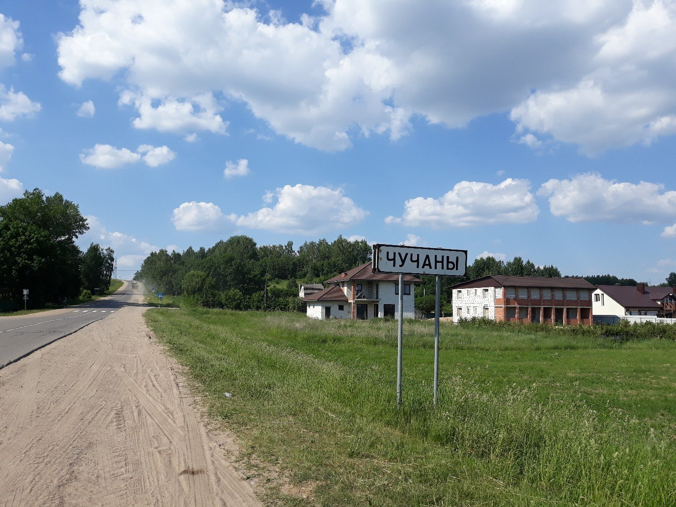 вёска ў траўне 2018